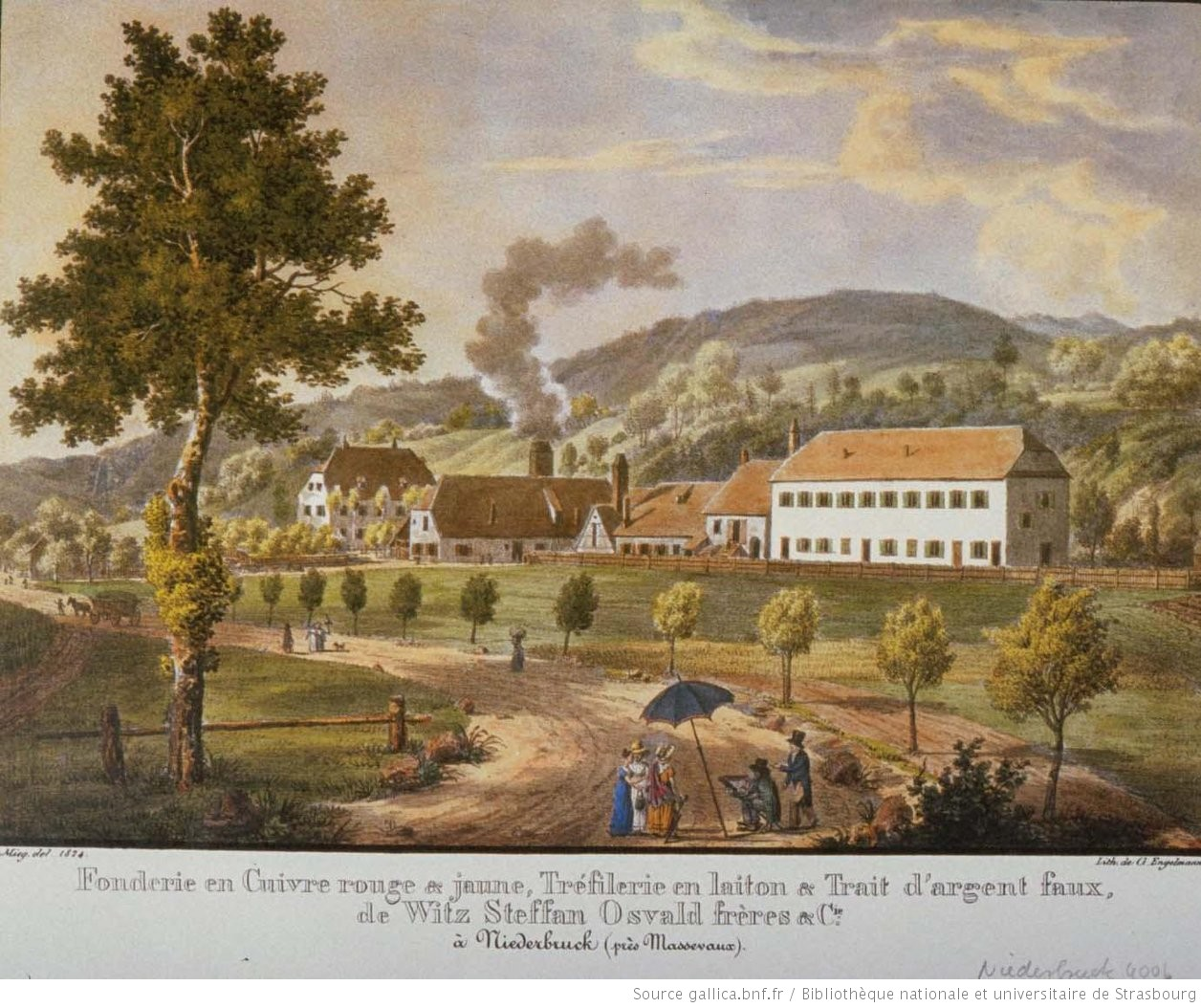 Fonderie en cuivre ..., treflerie en laiton..., de Witz, Steffan Osvald frères et Cie à Niederbruck